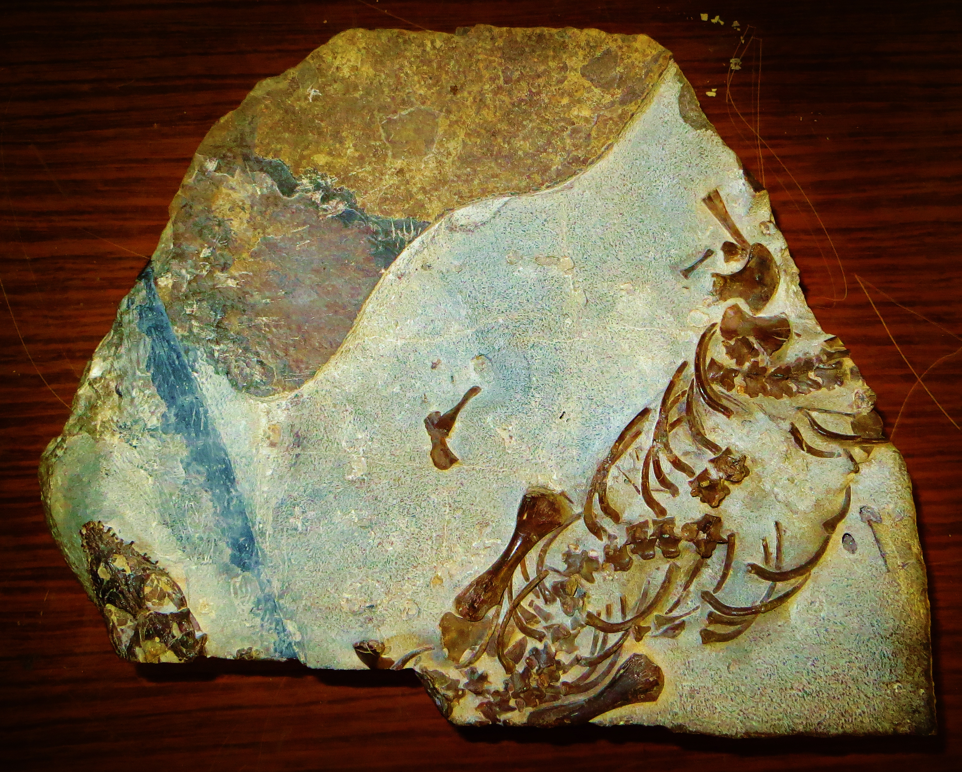 Fossil of Odoiporosaurus - Took the picture at Museo di Storia Naturale, Milano